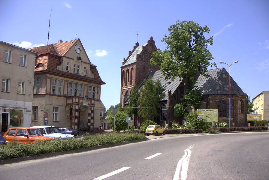 Karlino, widok na Kościół i Ratusz; autor zdjęcia Marzena Czarnas; 12.01.2006 r.